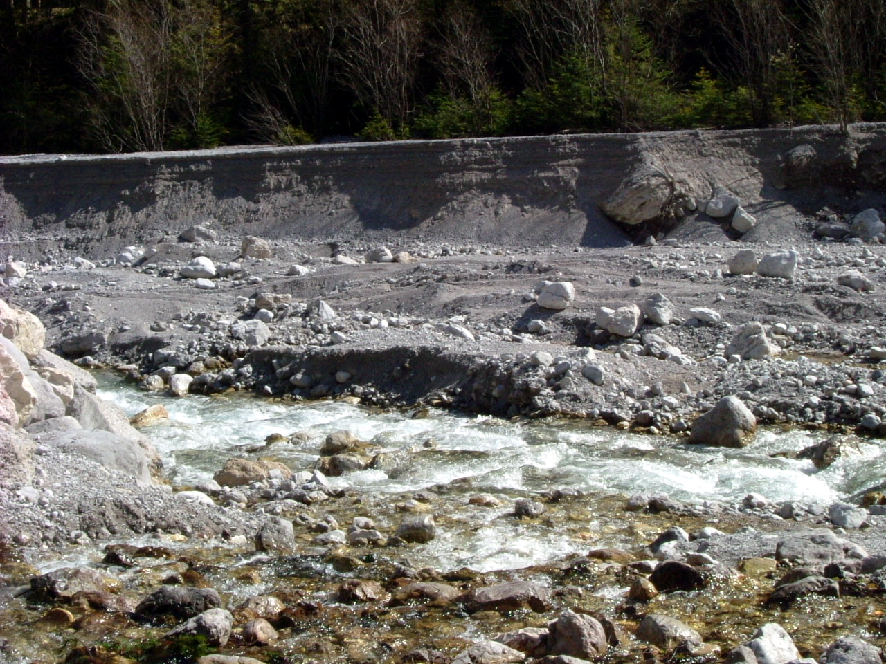 erodierte Aufschüttungsterrasse im Wimbachtal (Berchtesgadener Alpen)